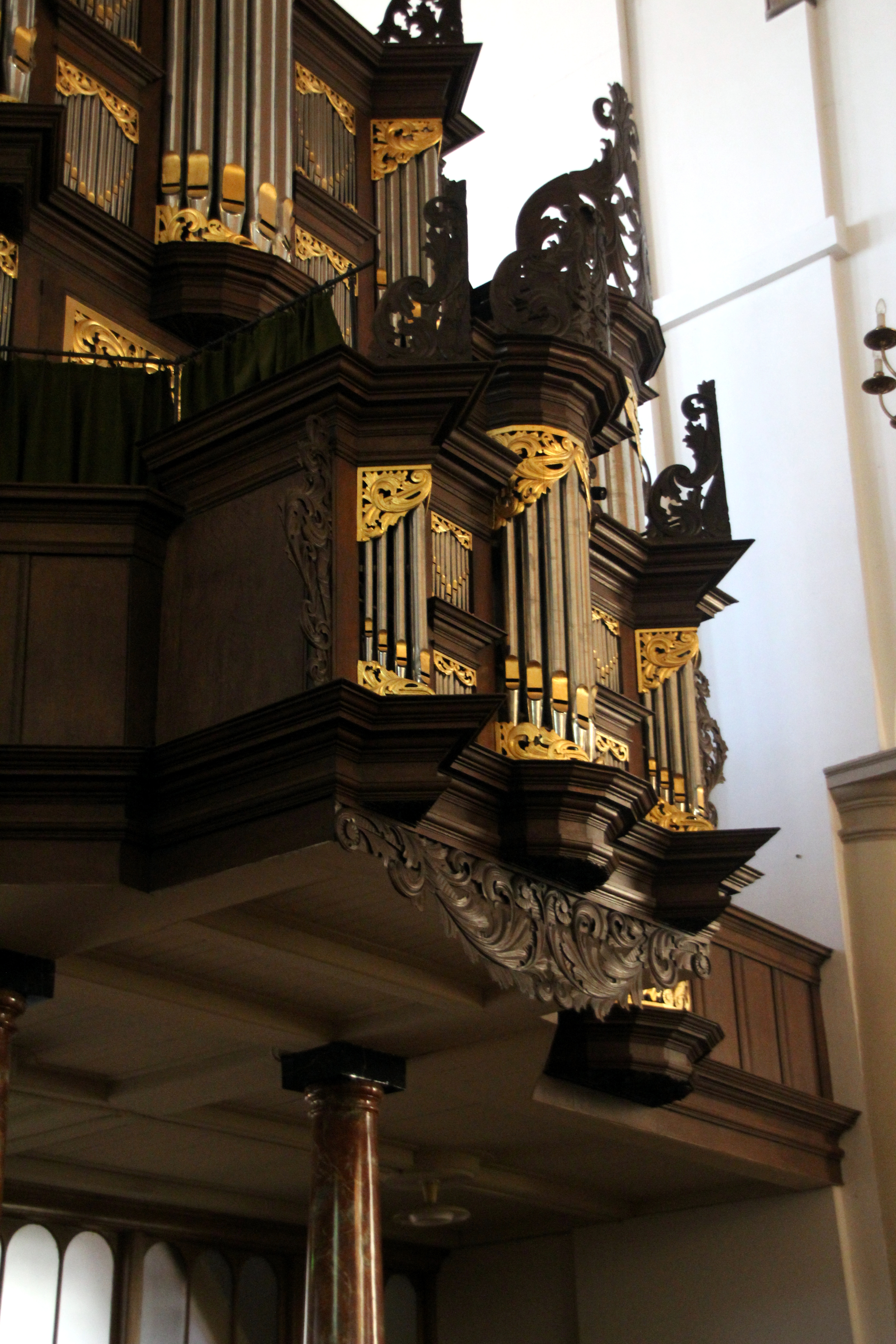 Schnitger-Orgel der Martinikerk in Sneek, Friesland, Niederlande